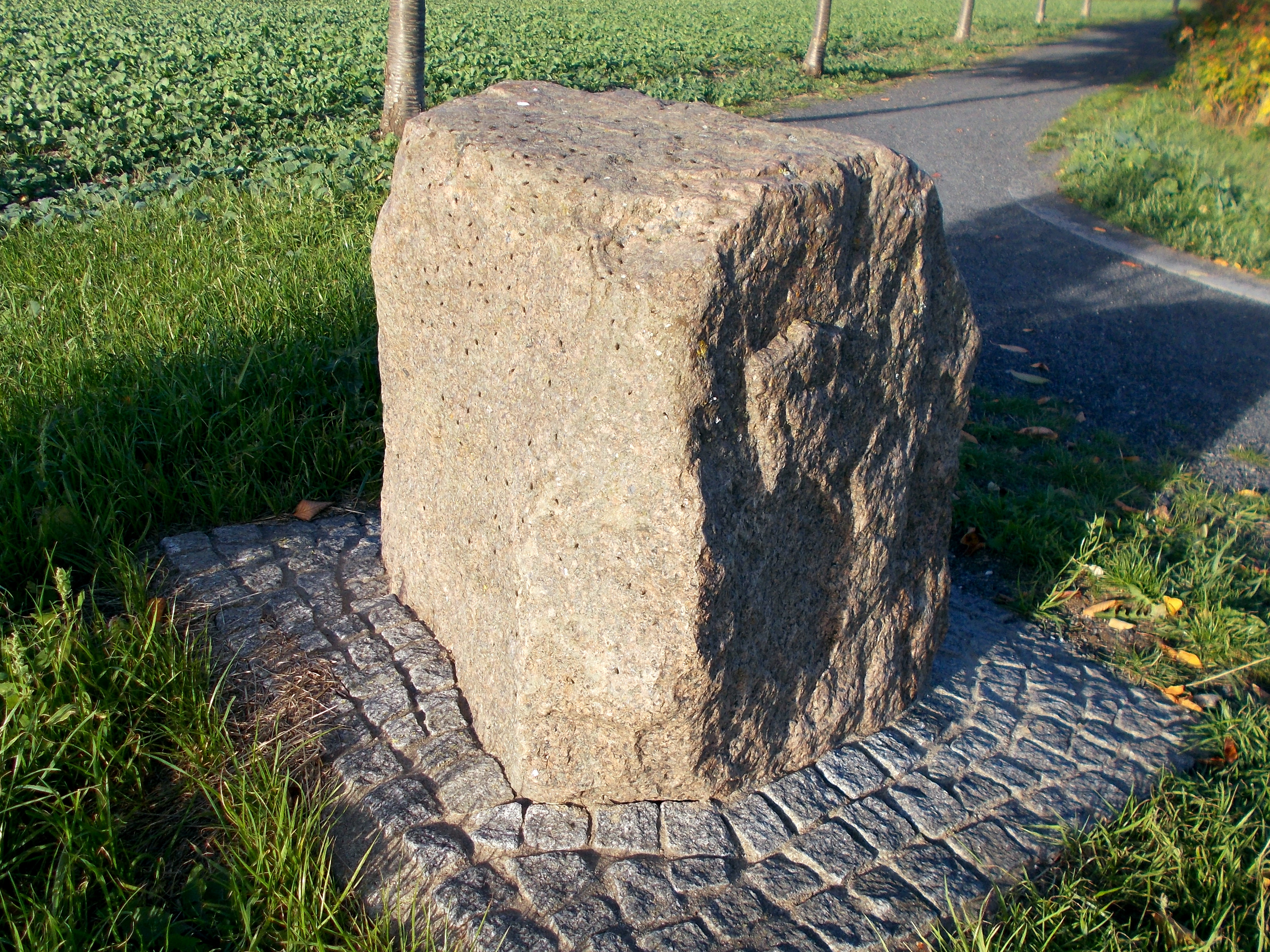 Findlingsweg Sonsbeck Station: Granit (Findling aus Skandinavien) mit sonnenden Fliegen.